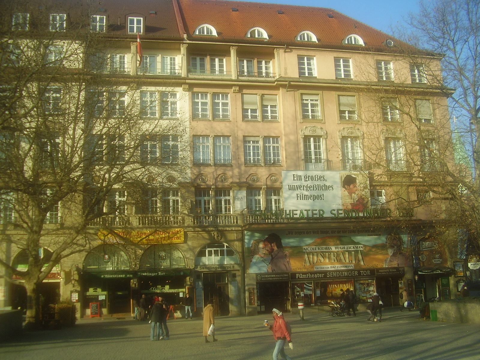 Filmtheater am Sendlinger Tor, Sendlinger Tor Platz, München; gegründet 1913 von Carl Gabriel unter dem Namen „Sendlinger Tor Lichtspiele“